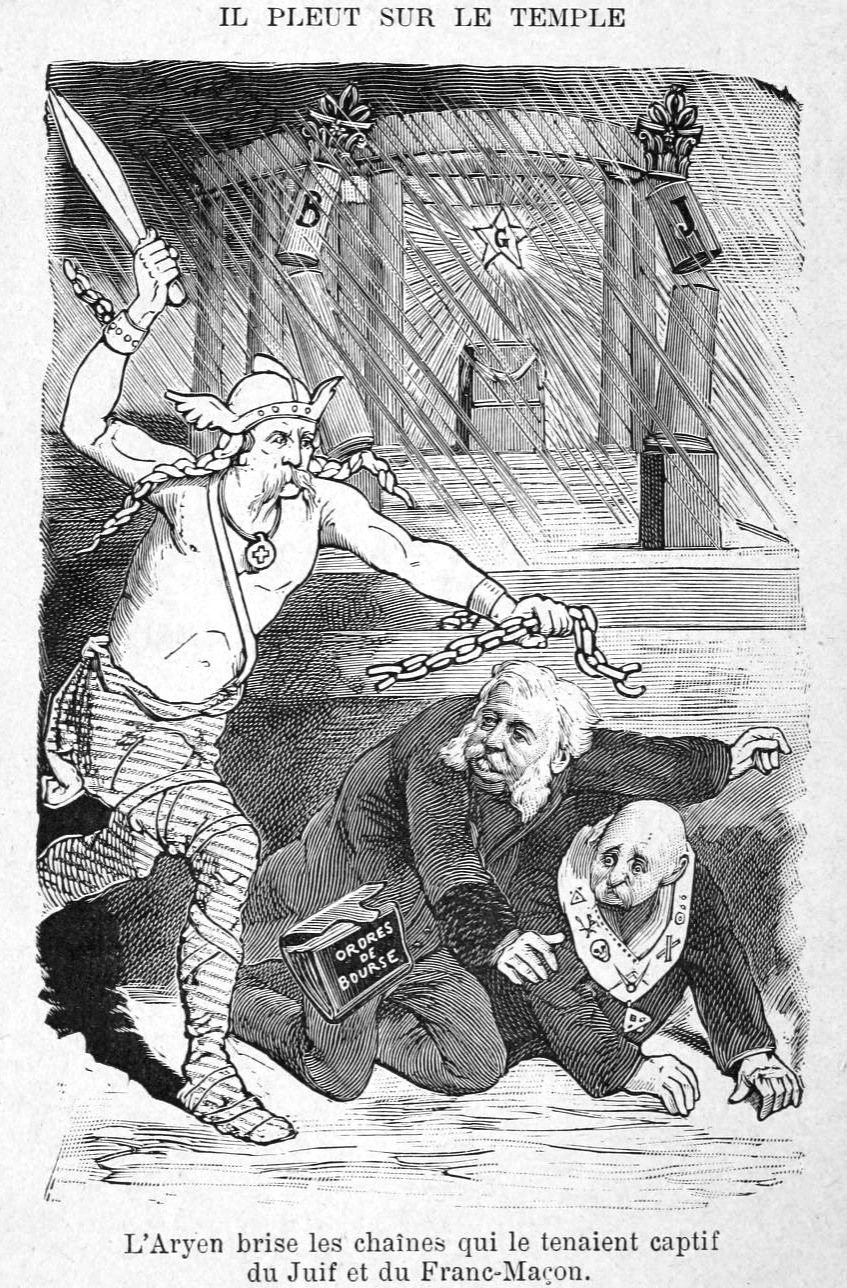 "Il pleut sur le Temple. L'Aryen brise les chaînes qui le tenaient captif du Juif et du Franc-Maçon."